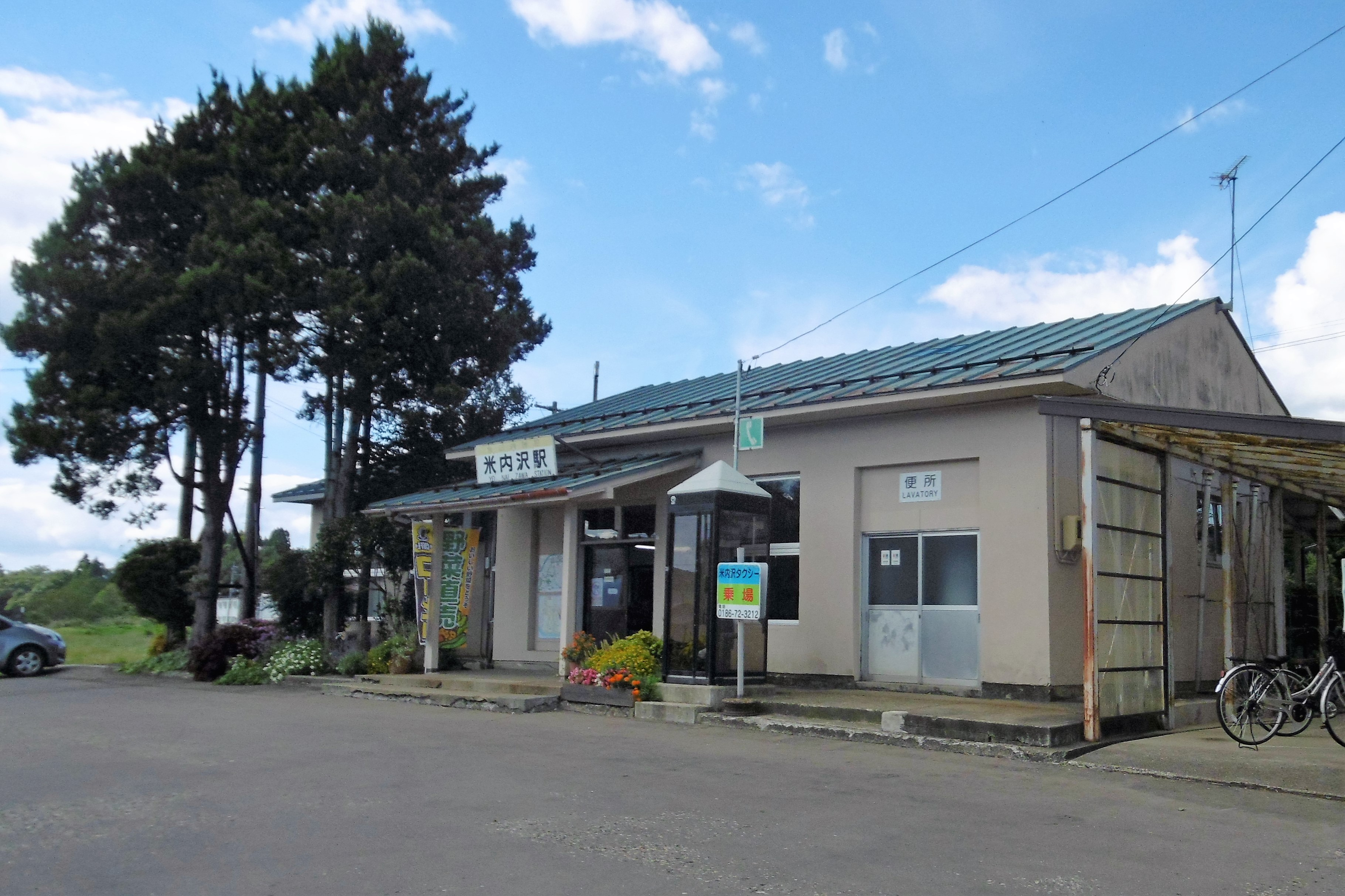 秋田内陸線・米内沢駅